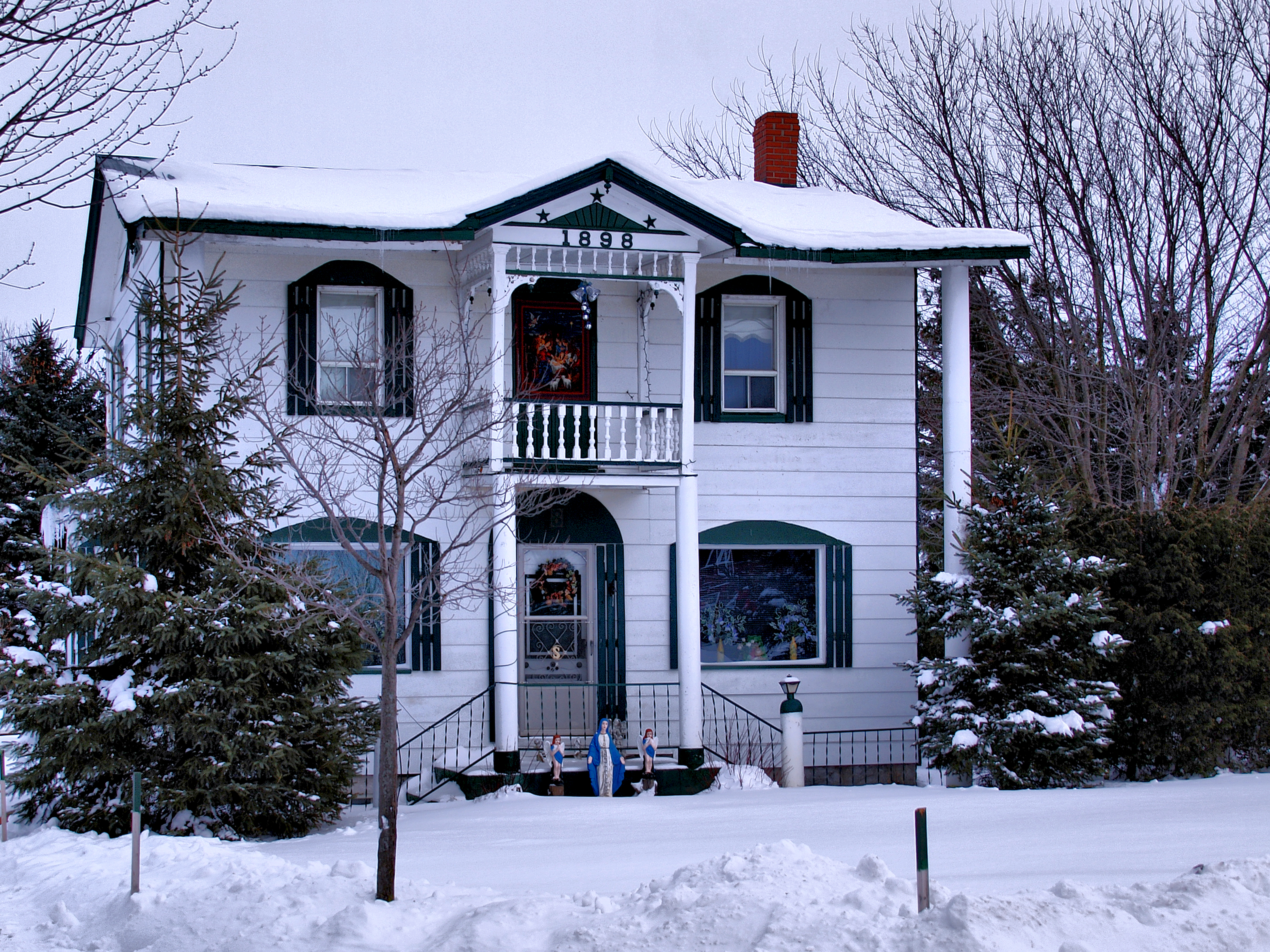 Saint-Valentin - Vieille maison du village